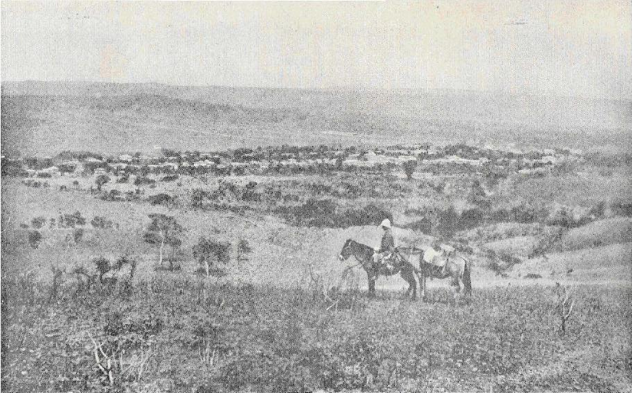 Foto panorâmica de Catalão, tirada em 1892 pela Expedição Cruls.